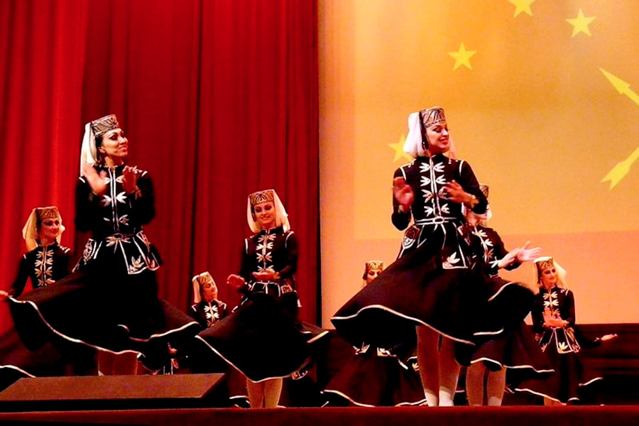 Солистки ансамбля танца «Нальмэс»